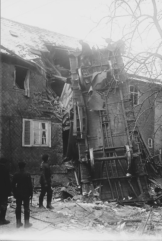 Zu dem großen Eisenbahnunglück auf der Strecke München-Berlin, wo bei Ludwigstadt ein Eilgüterzug mit 20 Wagen den 30 mtr. hohen Viaduckt hinabsauste. Ein in Höhe von 30 mtr. in ein Wohnhaus gestürzter Eisenbahnwagen.